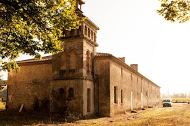 Pigeonnier contre les dépendances au sud. Au XIXe siècle, on s'en servait comme d'un château d'eau